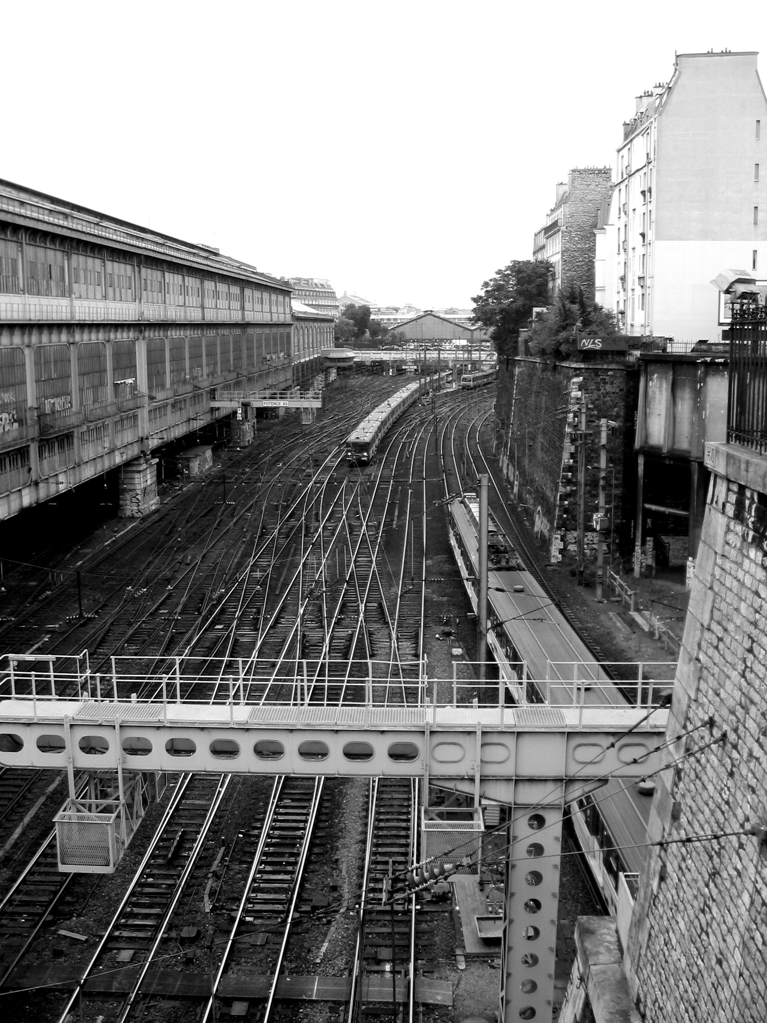 Les rails menant à la Gare Saint Lazare vus depuis le boulevard des Batignolles. Contraste accru.